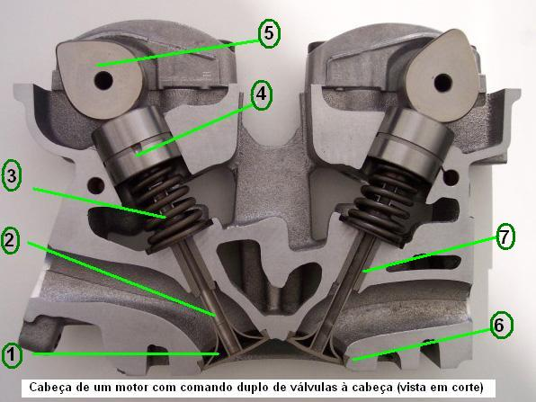 Corte de uma cabeça de motor vista em corte indicando posição das válvulas